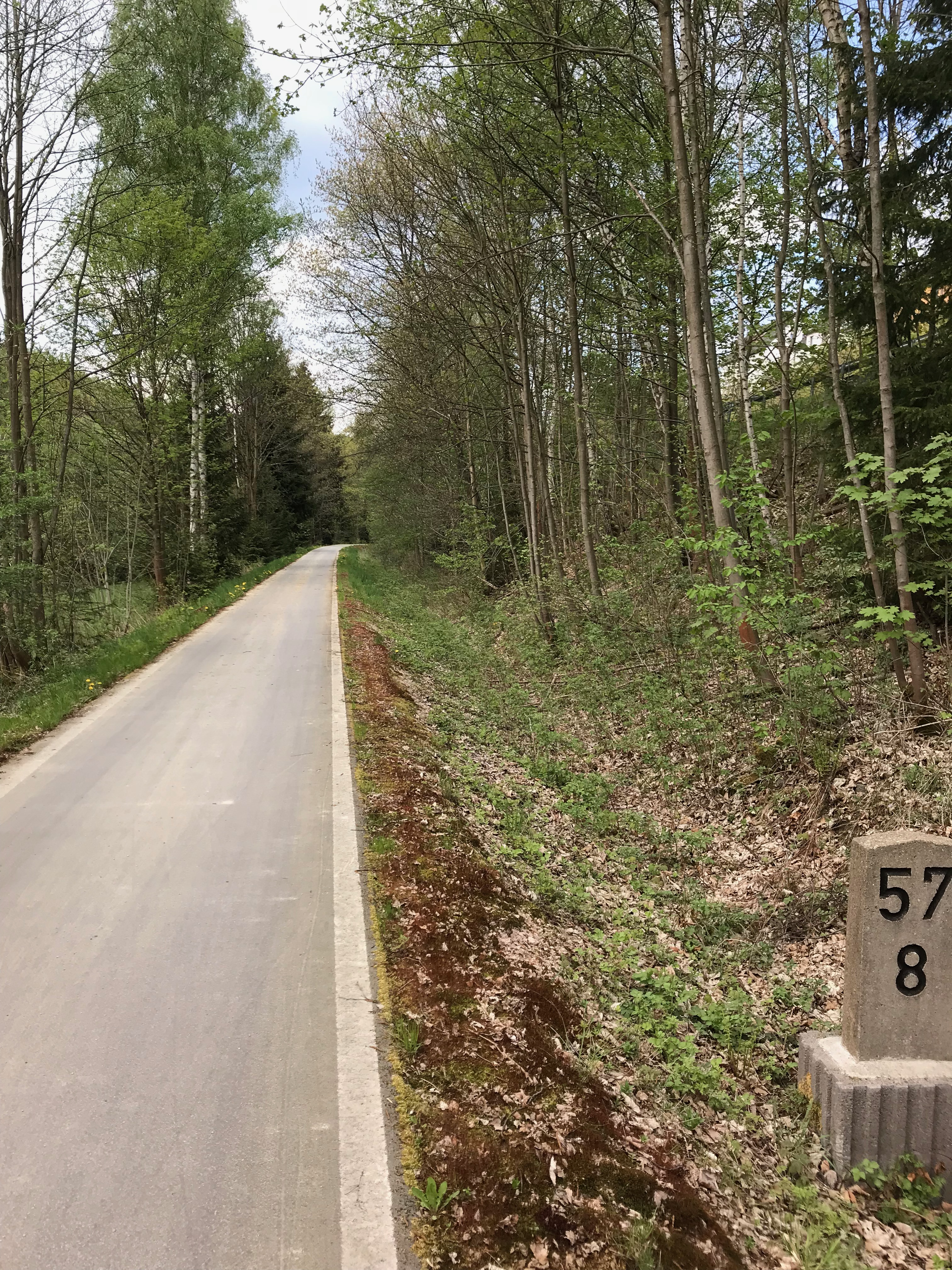 ehemaliger Haltepunkt Bockau (Erzgeb) Ost (2018)